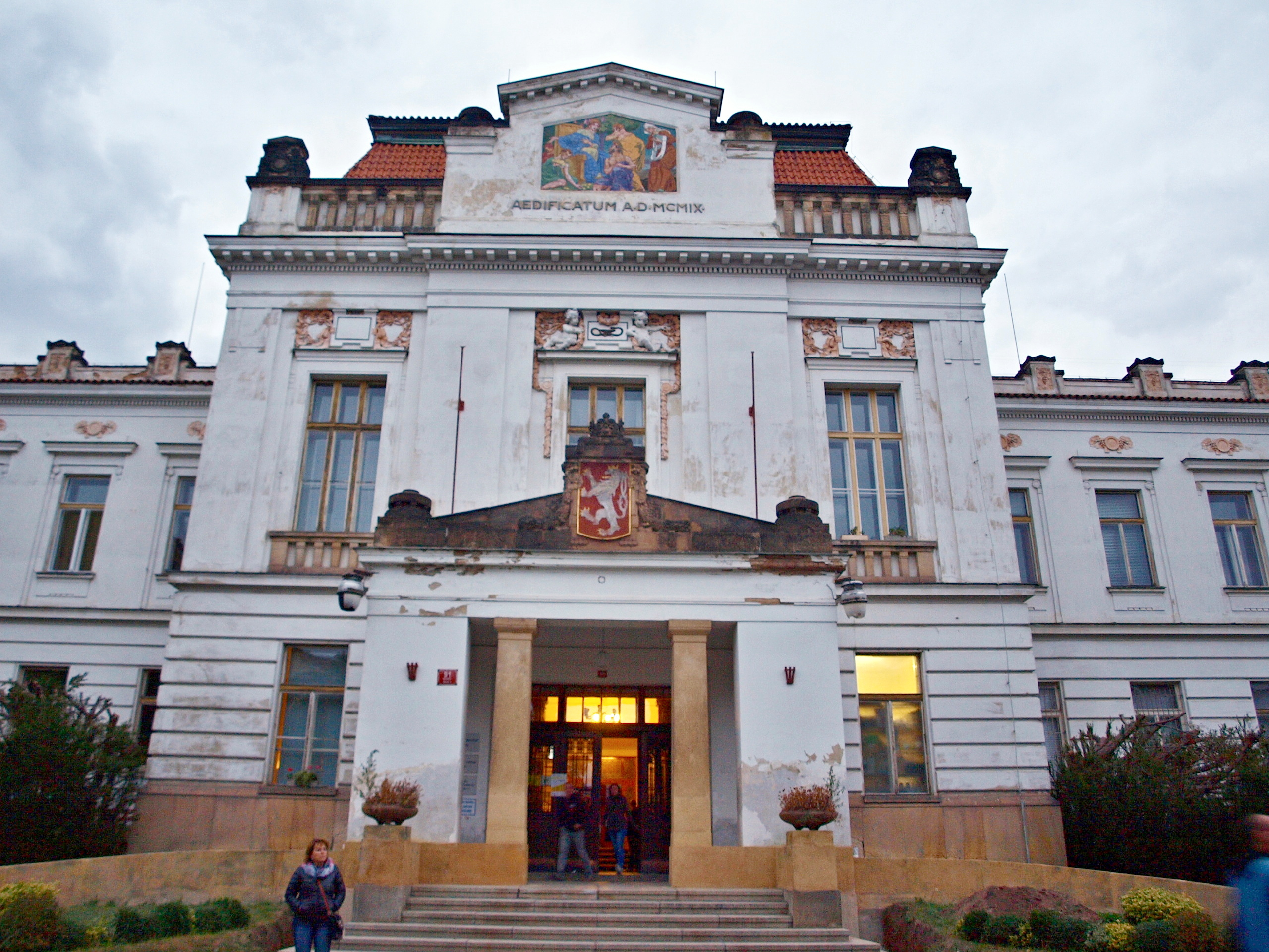 Psychiatrická léčebna Bohnice